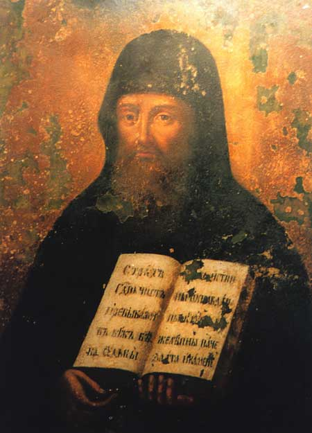 Saint Mercurius of Kyiv Caves (14th cen.), Orthodox saint from Ukraine. Меркурій пісник - XIV ст. Чернець Печерського монастиря. Преподобний. Пам'ять 10 вересня, 17 листопада і 7 грудня. Про цього святого відомо тільки те, що за життя він був близьким товаришем прп.Паїсія, з яким жив в одній келії. Поховали їх разом. Мощі преподобного Меркурія спочивають у Дальніх печерах.